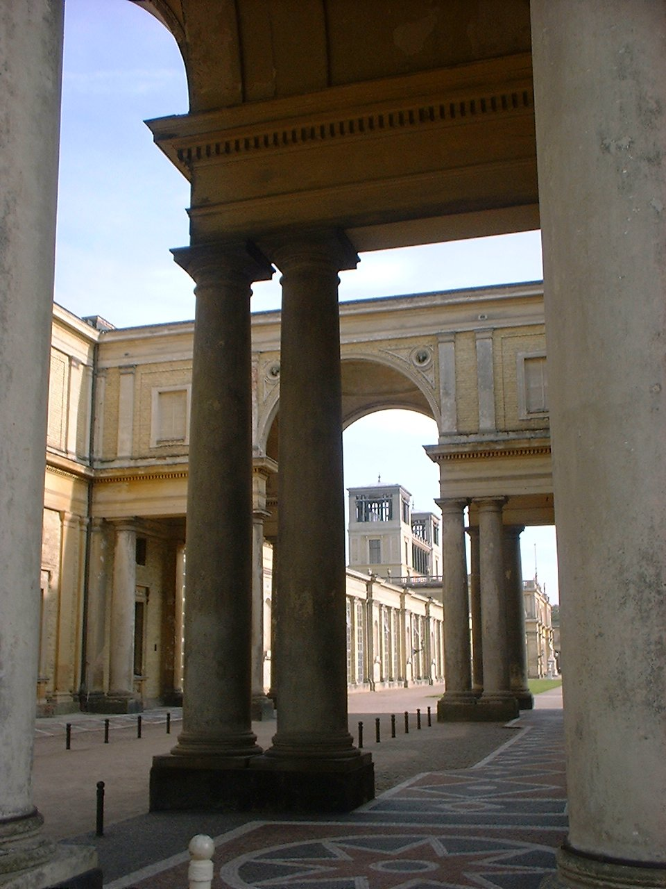 Orangerie in Potsdam in Germany